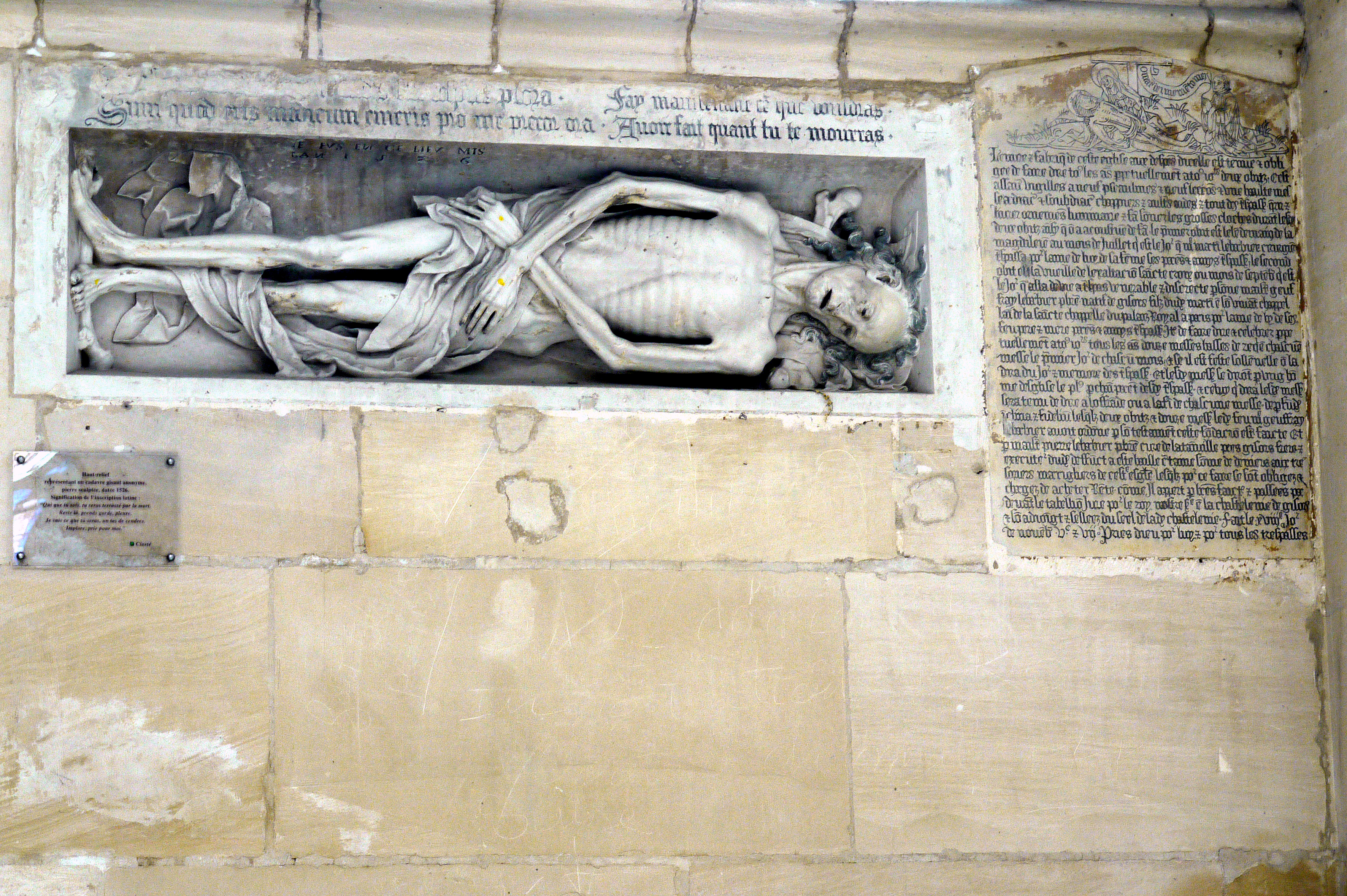 Gisant de la Collégiale Saint-Gervais-Saint-Protais de Gisors Haut relief représentant un cadavre gisant anonyme en pierre sculptée datée de 1526. Une inscription latine accompagne la sculpture : "Qui que tu sois, prends garde, pleure. Je suis ce que tu seras, un tas de centres. Implore, prie pour moi.